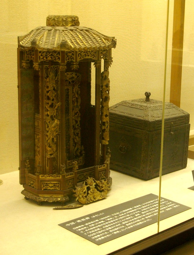 2008年福岡市内で撮影｢元寇史料館」